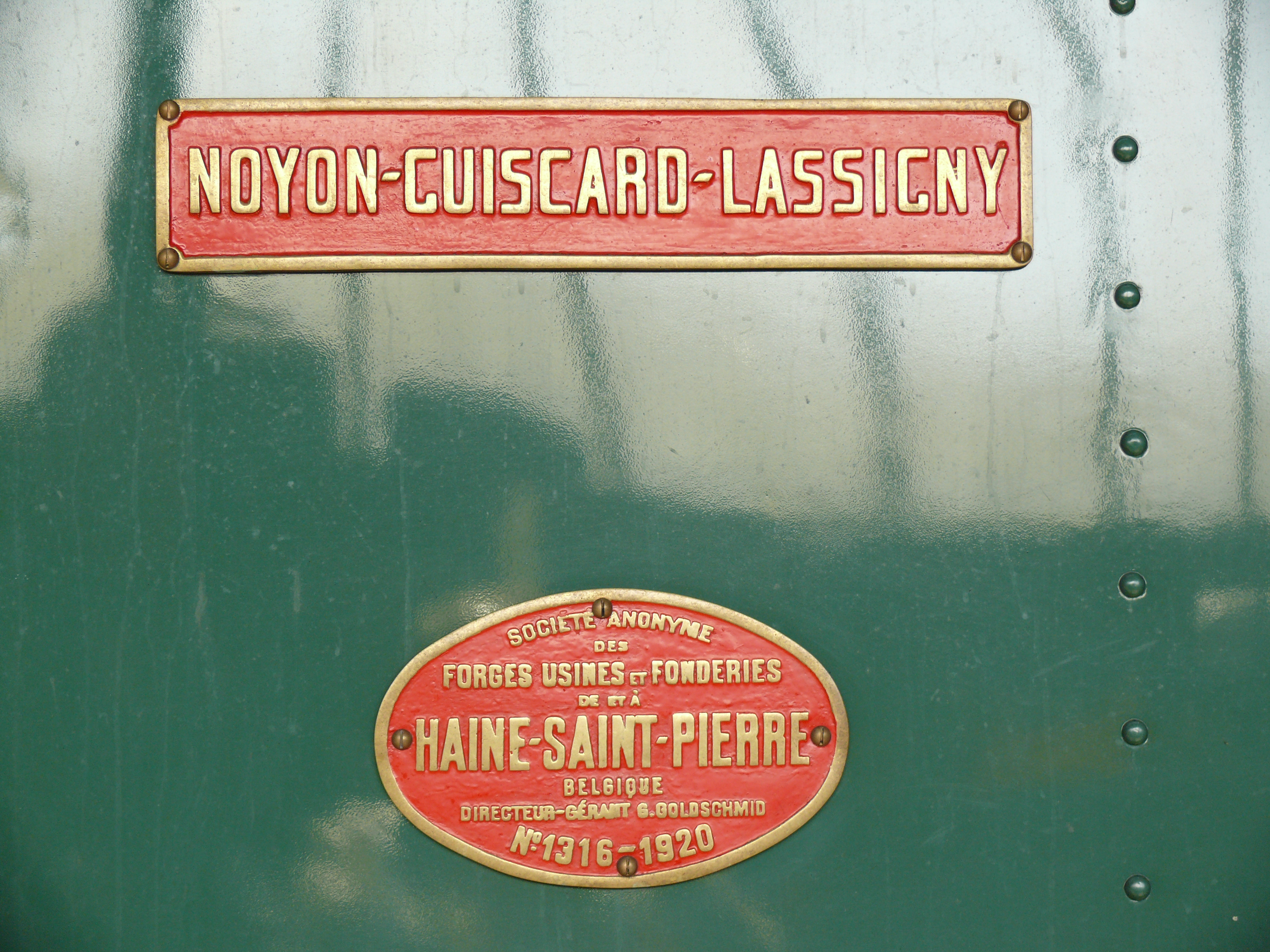 Plaques de constructeur et de propriétaire de la locomotive Haine-Saint-Pierren°025 de la compagnie Noyon à Guiscard et Lassigny, en cours de restauration au dépôt de Saint-Valery Canal